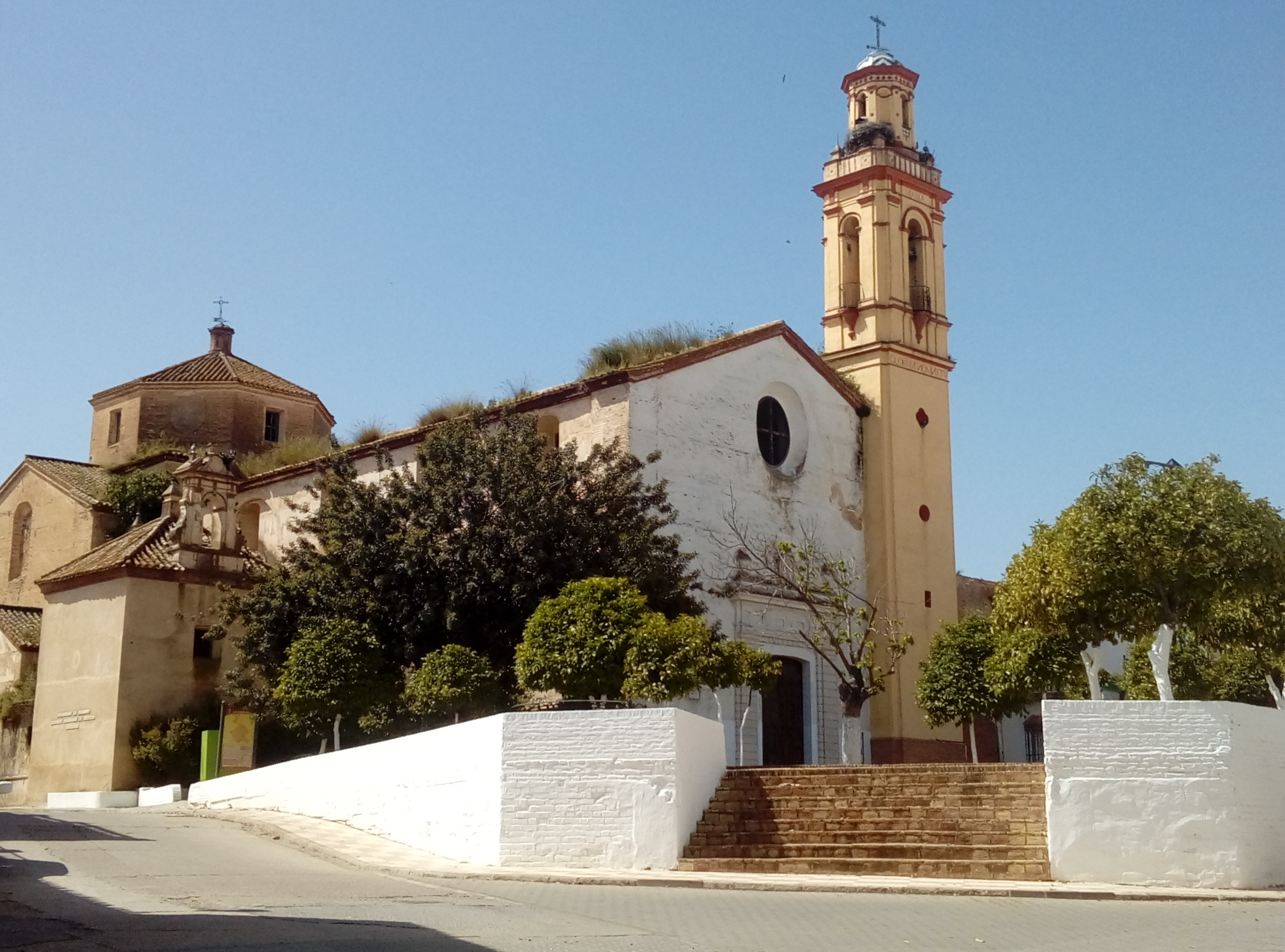 Iglesia de San Sebastián en La Campana (Sevilla).